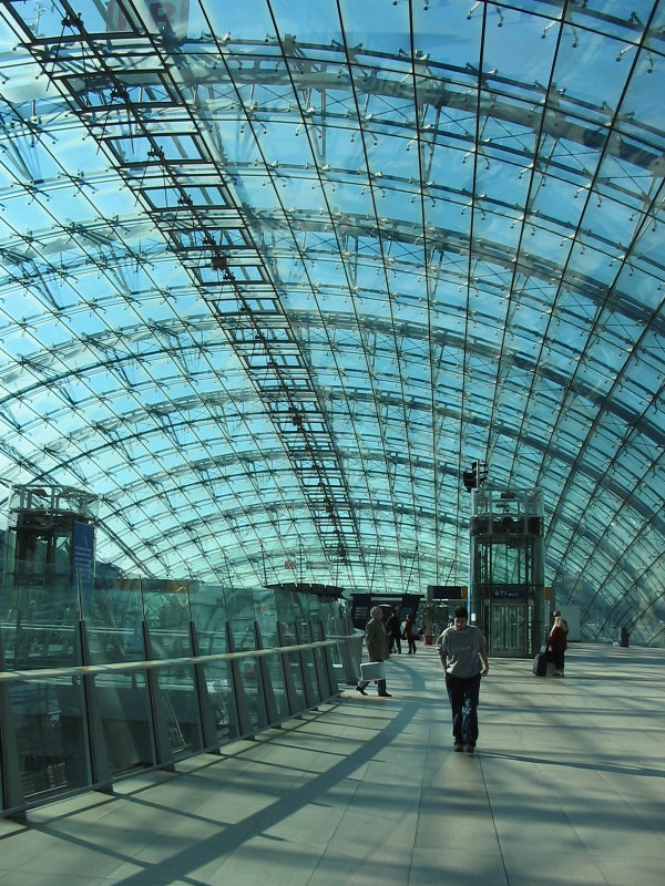 Frankfurt (Main) Flughafen Fernbahnhof, Bahnhofshalle.